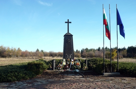 Черният паметник